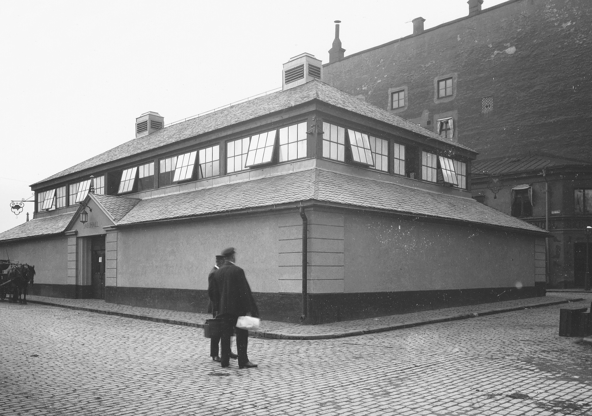 Nya Norra Köttorgshallen vid Köttorget i Gamla stan